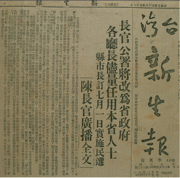 《台灣新生報》刊登1947年3月6日臺灣省行政長官陳儀向省民廣播全文，預定1947年7月1日實施縣市長民選。